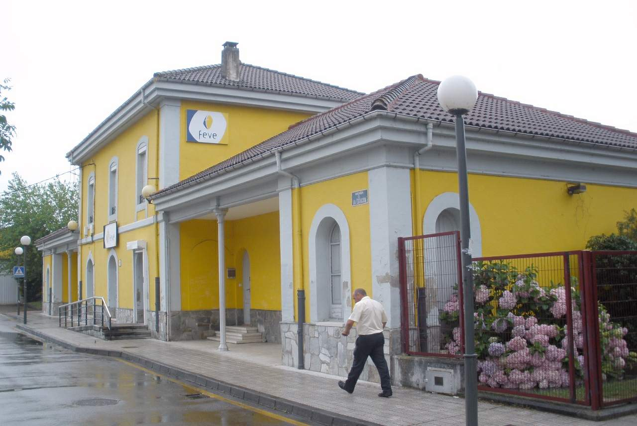 Estación de FEVE en Nava (Asturias)